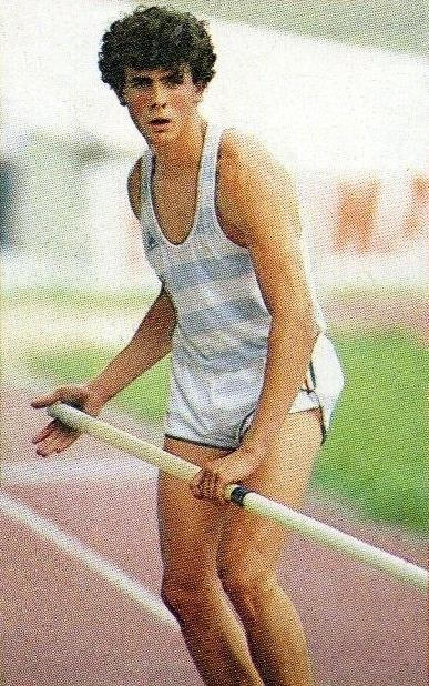 Pierre Quinon en 1986, 'Supersport 1986', Panini figurina n°15